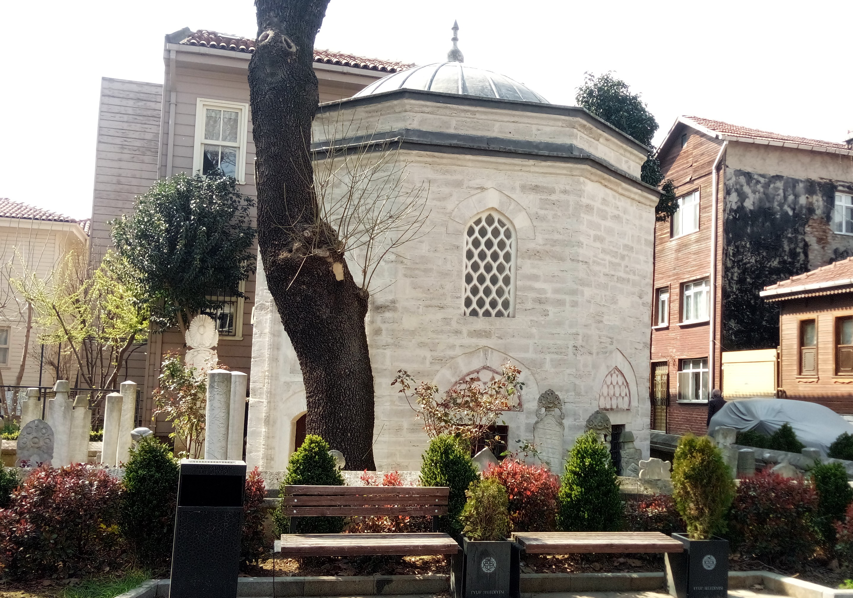 Osmanlı Dönemi Hanım Divan Şairlerinden Hubbî Hatun